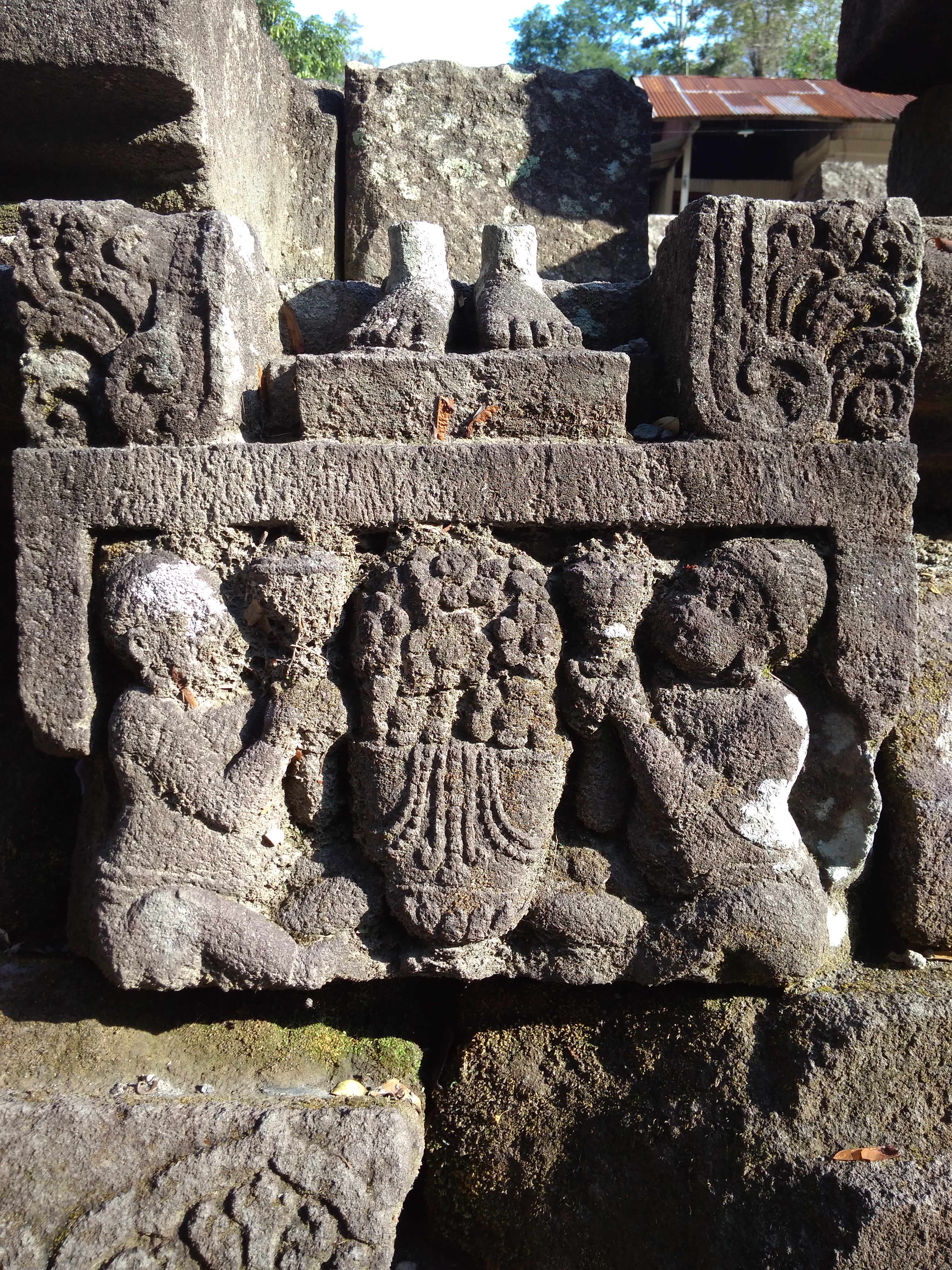 Relief di Candi Morangan